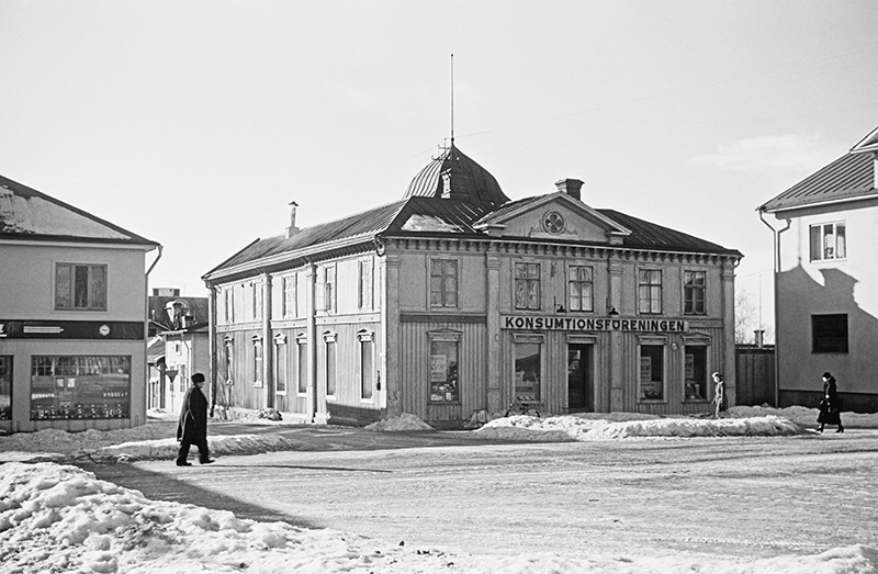 Stora torget. Hus med Konsumbutik. Motiv: Piteå Kategori: Stadsmiljö Stora torget. Hus med Konsumbutik.